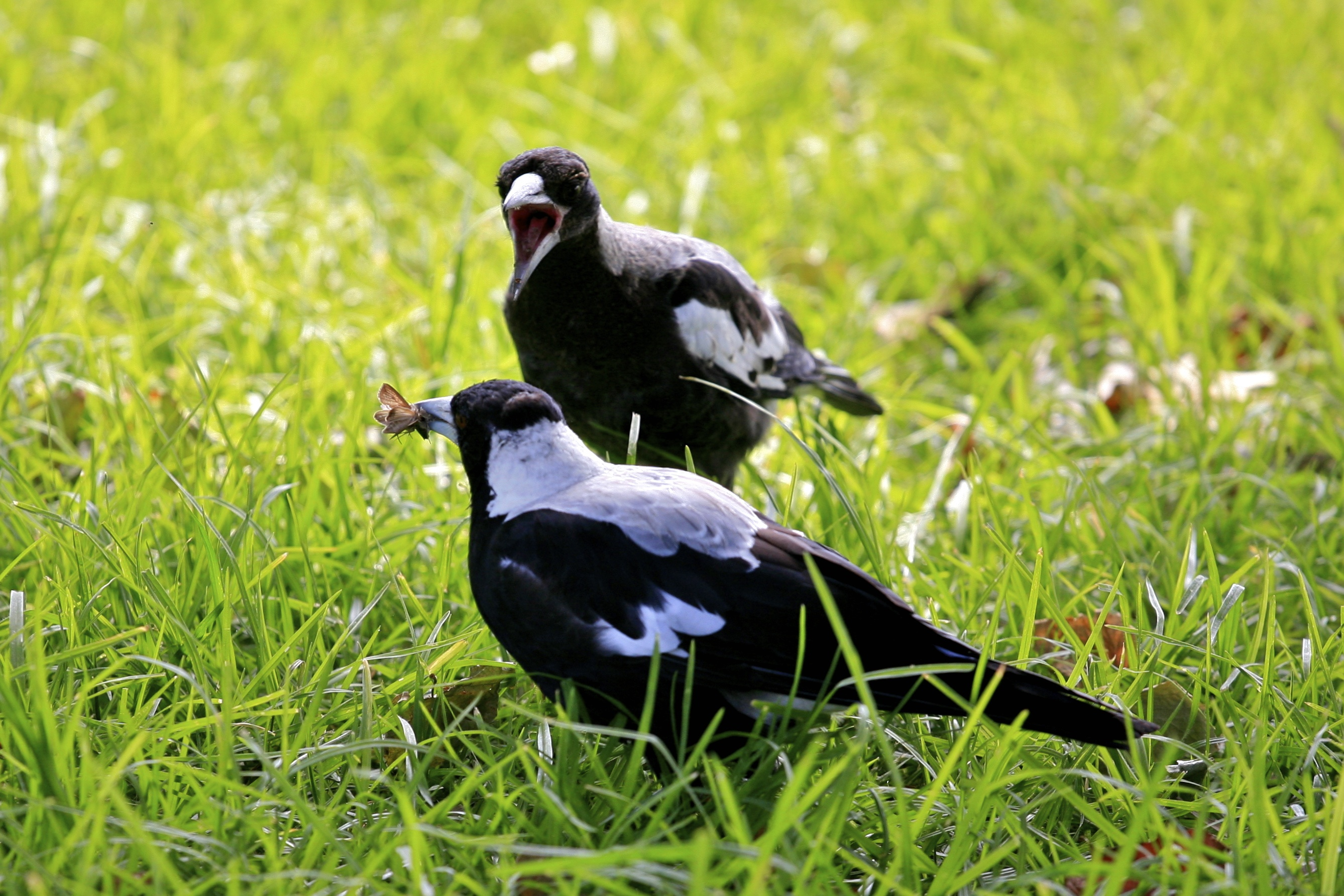 Magpie Feeding Time